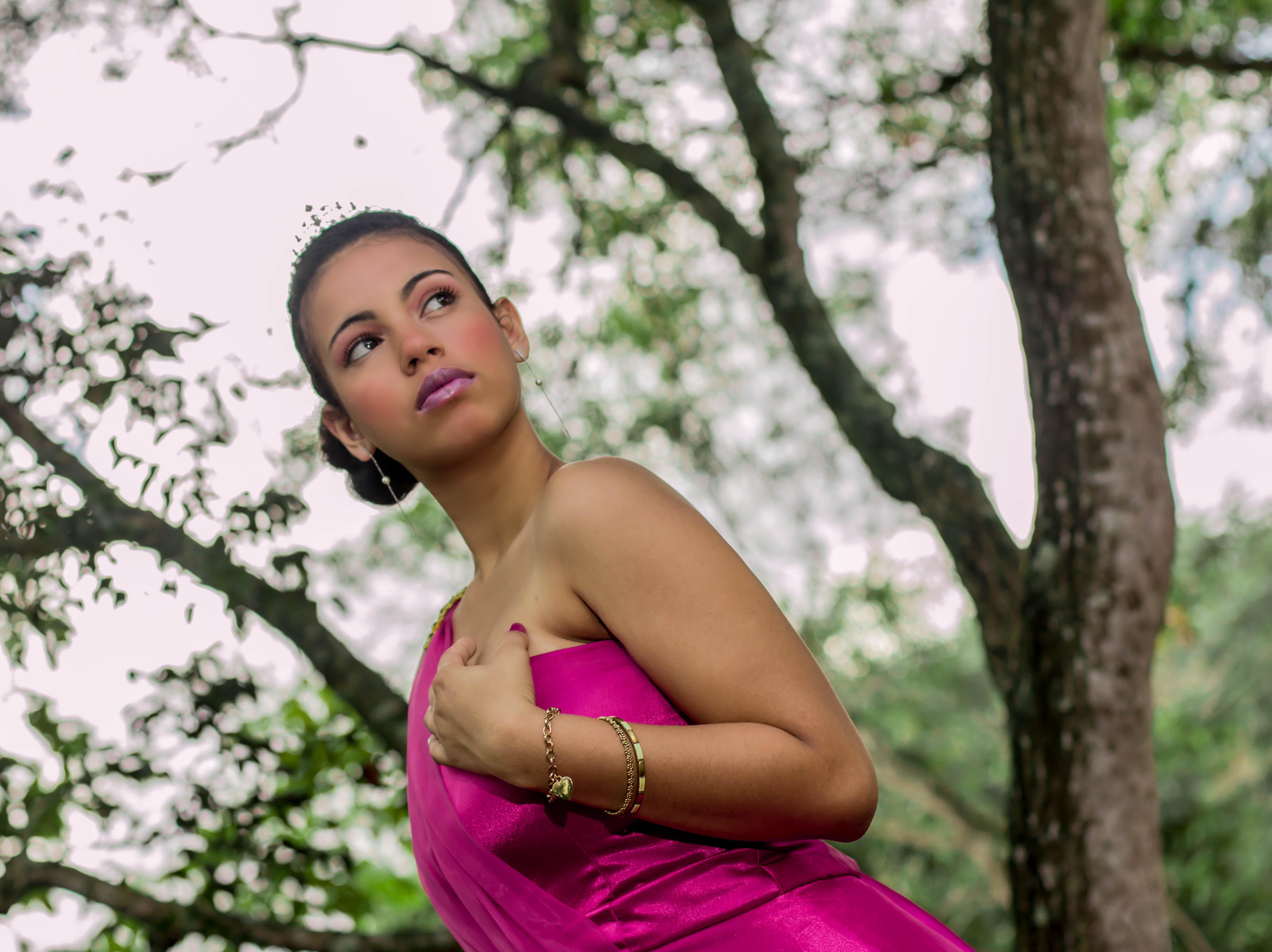 Foto de Diana Garcia